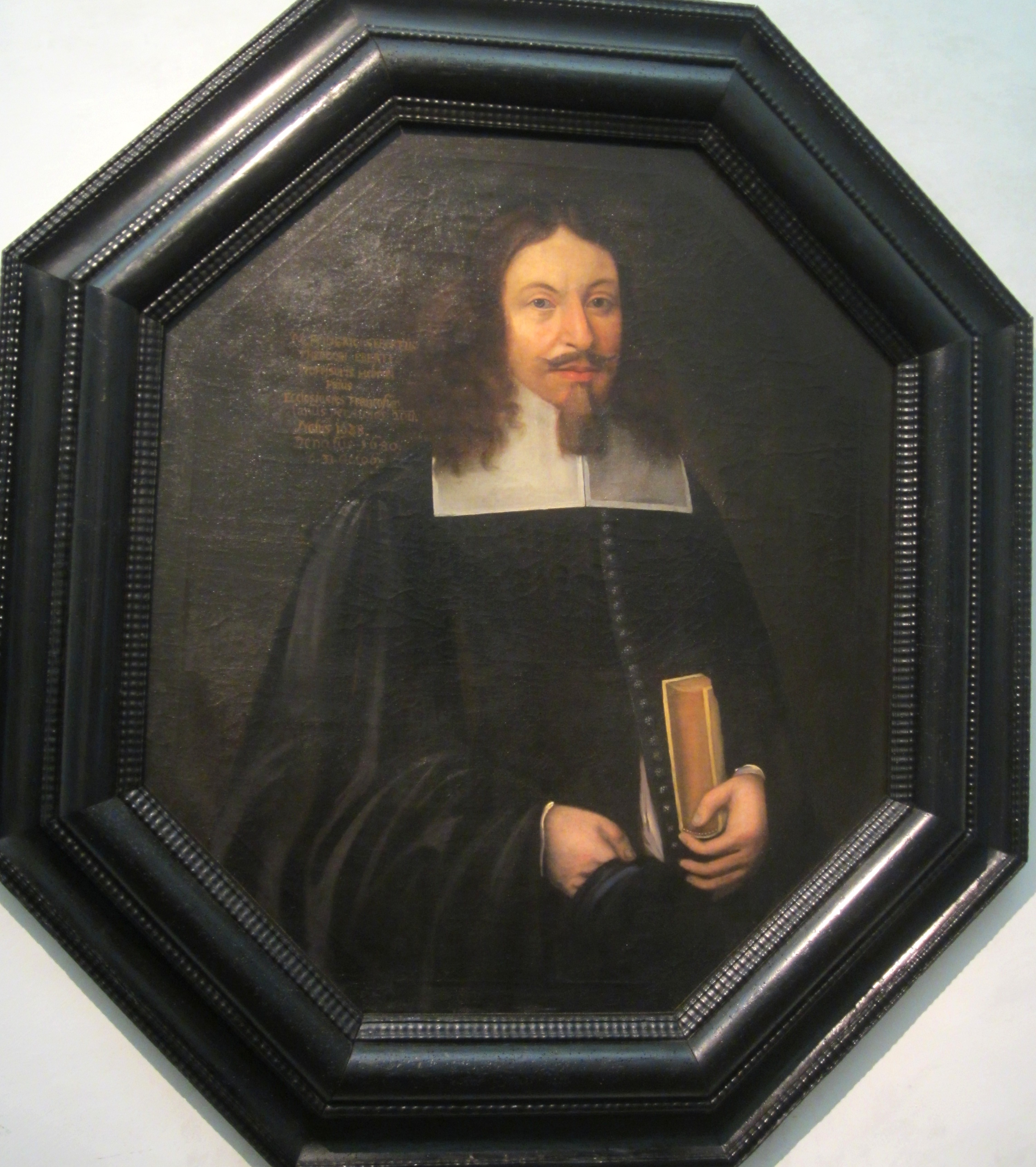 Friedrich Ebert (1628–1680)